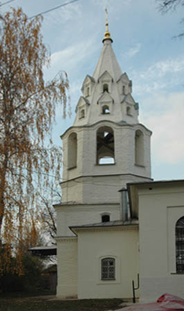 Коломна. Колокольня церкви Иоанна Предтечи